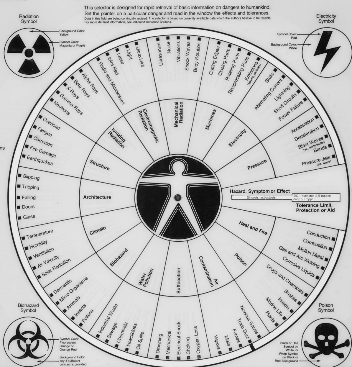 diagram jednotlivých vlivů prostředí na tělo